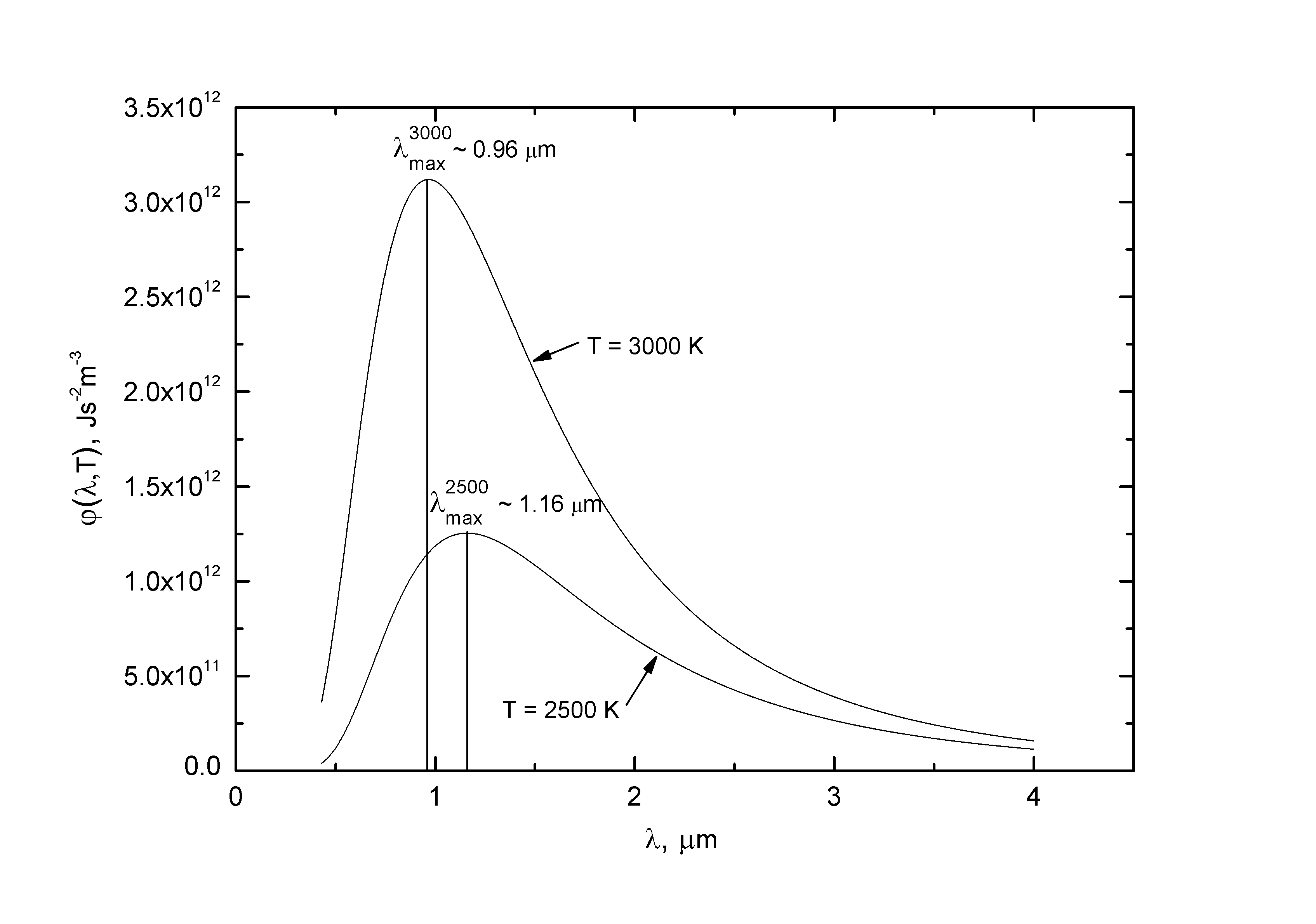 Для нахождения закона, по которому происходит смещение максимума φ(λ,Т) в зависимости от температуры, надо исследовать функцию φ(λ,Т) на максимум.